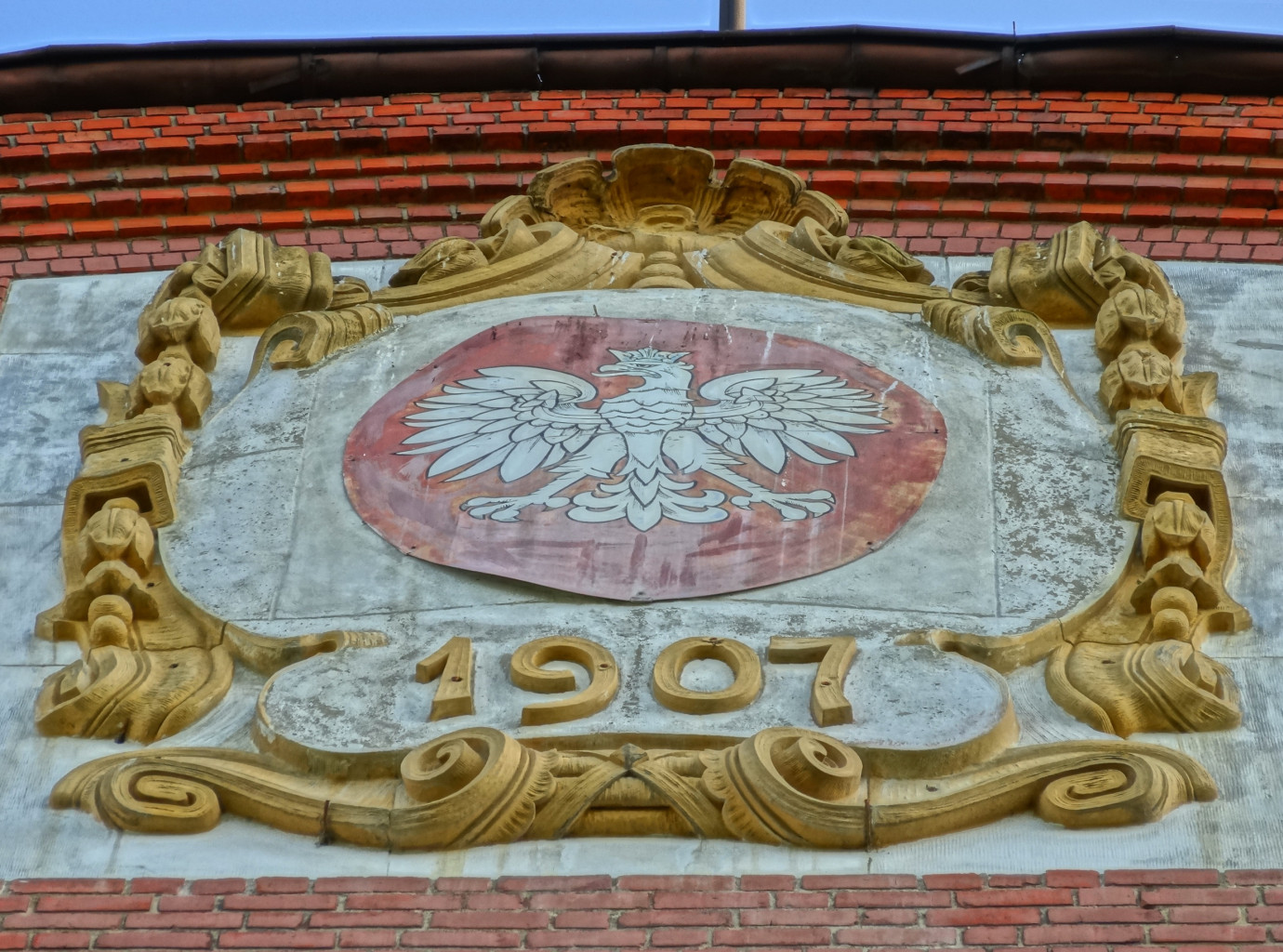 Budynek Wydziału Chemii UTP w Bydgoszczy, ul Seminaryjna 3 (inż. Huber z Berlina, 1905-08), dawniej katolickie seminarium nauczycielskie powołane w 1907 r.